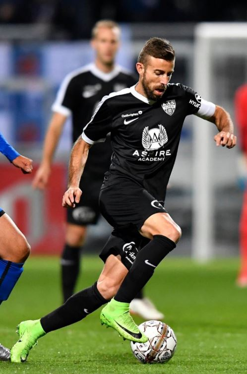 Luis Garcia (Eupen-Rupel Boom)